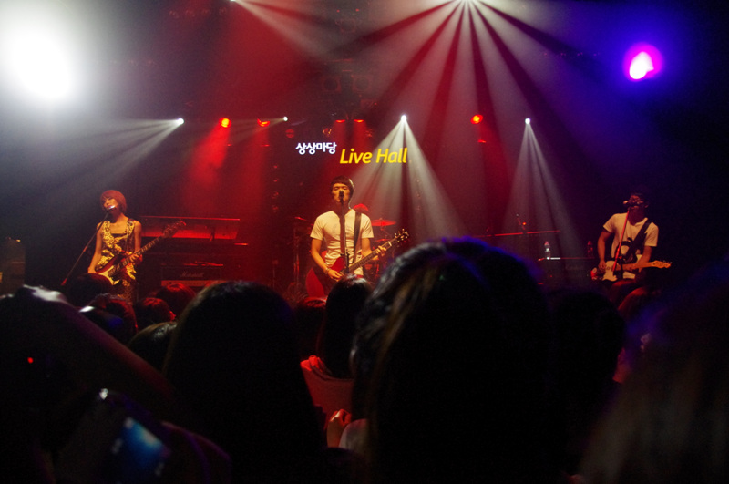 민트페스타 vol.27 Summer in the city. 홍대 상상마당 Live Hall 2010.07.18. 오후5시.